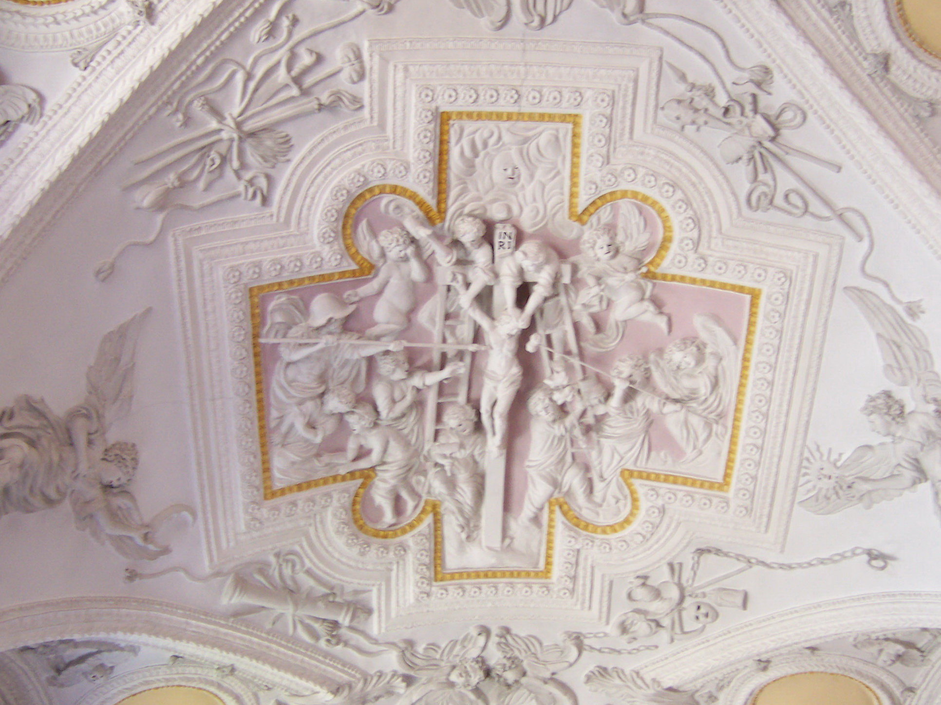 Essenbach, Rathausplatz 13. Katholische Kirche Mariä Himmelfahrt. Saalbau mit später angefügten Seitenschiffen, heute Staffelhalle, spätgotischer Bau um 1470, durch Seitenschiffe um 1670 und nochmals 1713 erweitert, im Kern romanischer Turm, spätgotisch erhöht, zunächst freistehend, 1713 in das südliche Seitenschiff integriert. Stuckrelief der Kreuzigung Christi in der nördlichen Seitenkapelle.